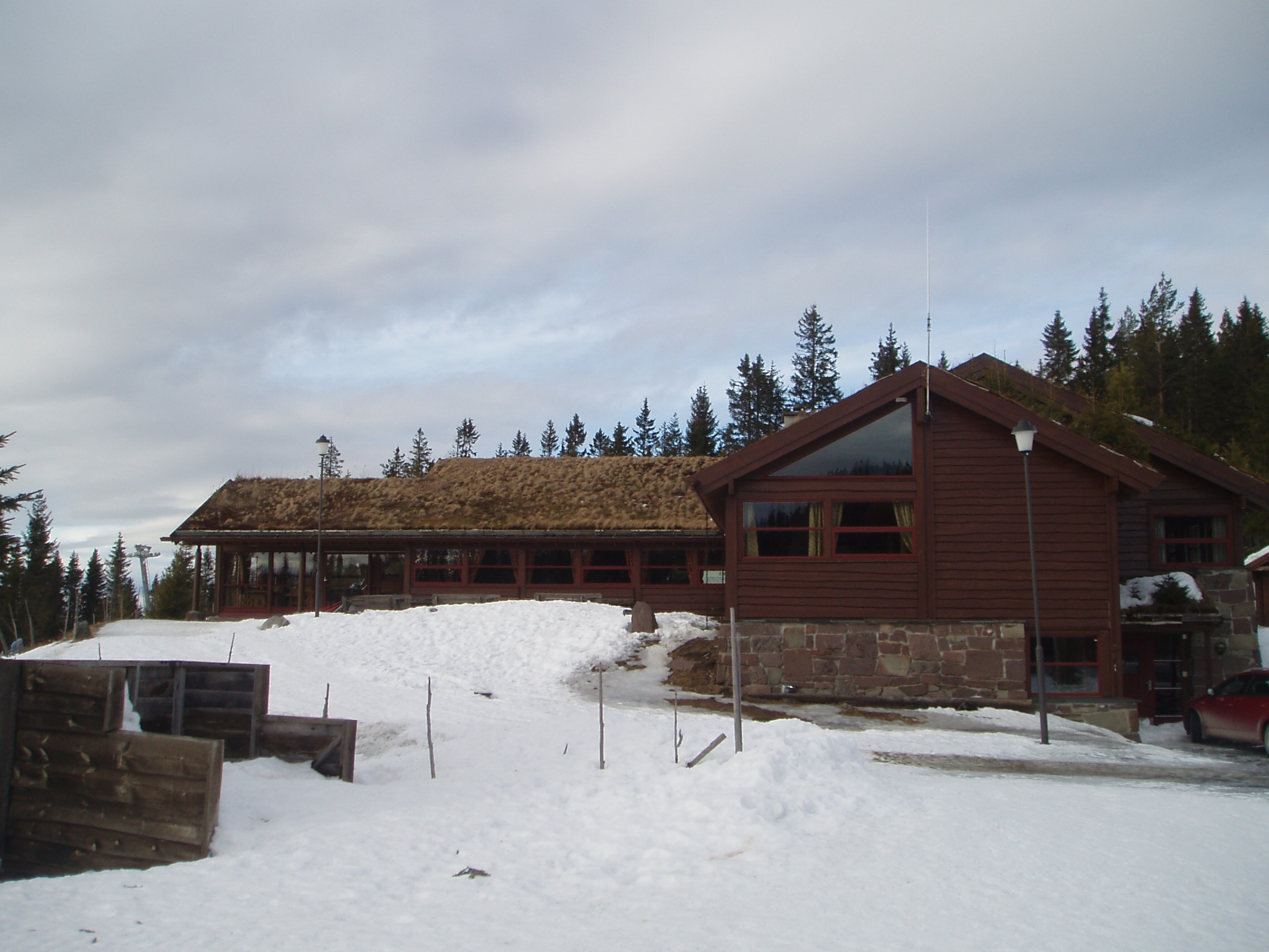 Ringkollstua